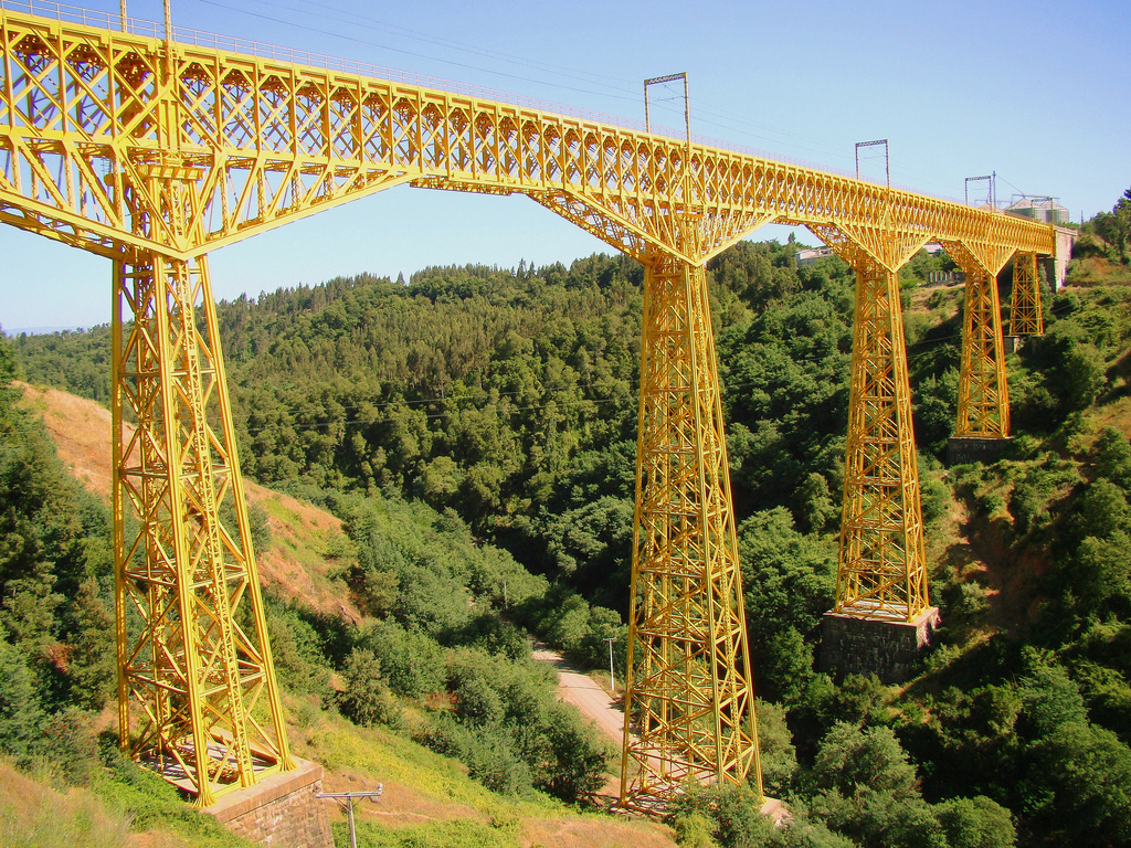 Viaducto del Malleco (Puente Ferroviario)